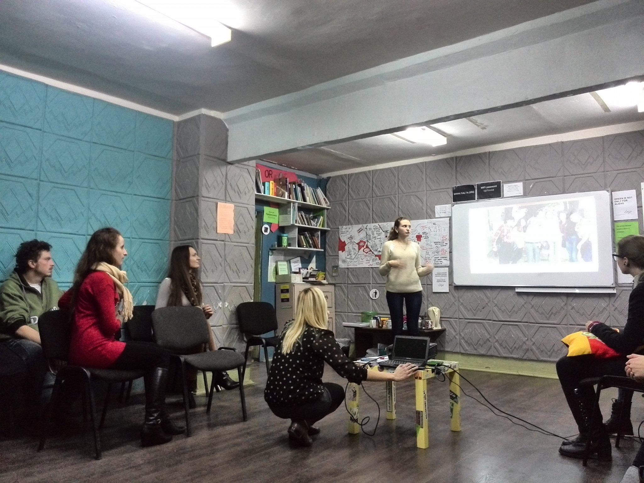 Презентация международного проекта "Жесты в Европе" ("Signs in Europe")